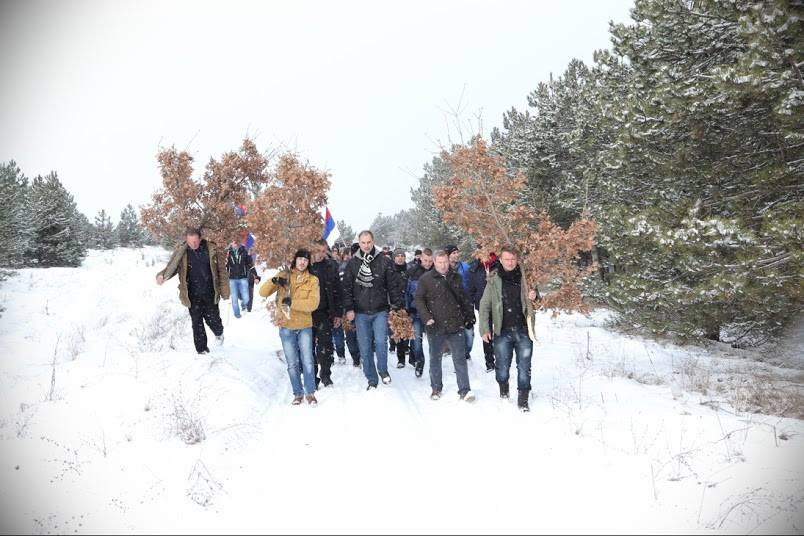 Сечење на Бадник бо организација на Српска заедница во Македонија. Старо Нагоричане